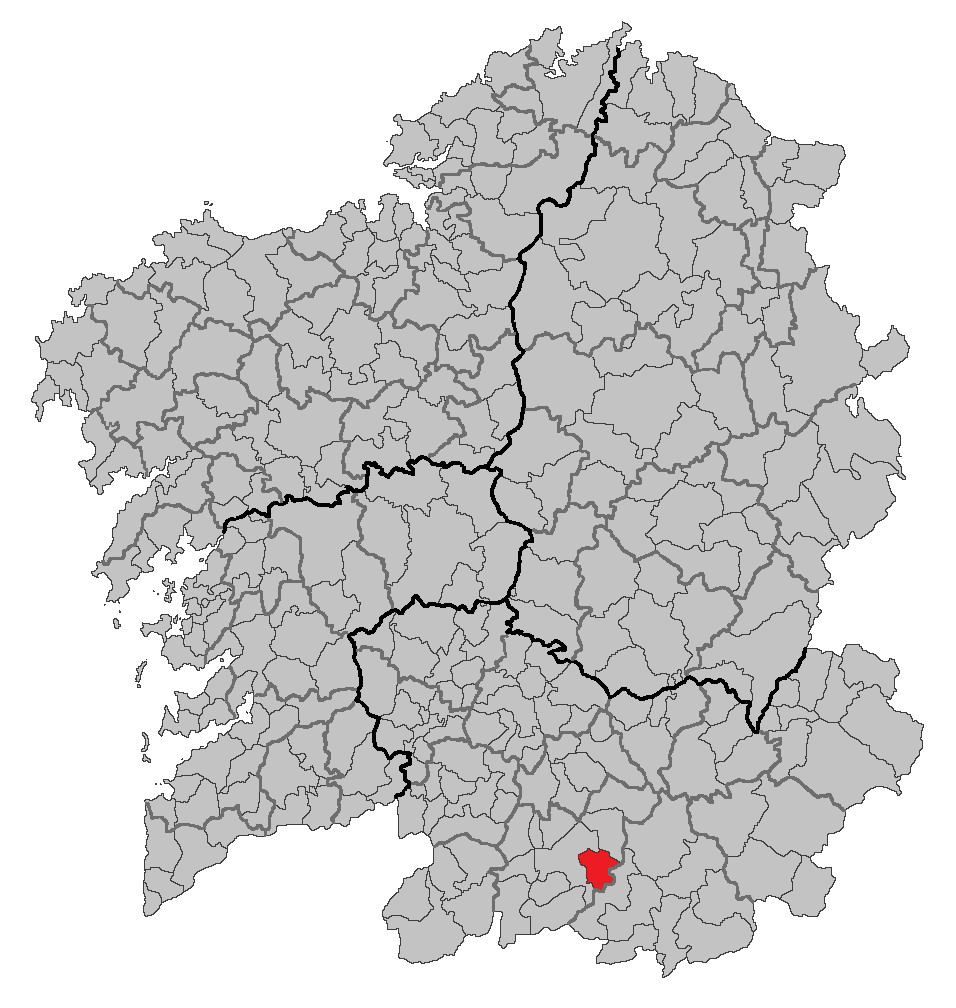 Mapa coa localización do concello de Trasmiras.